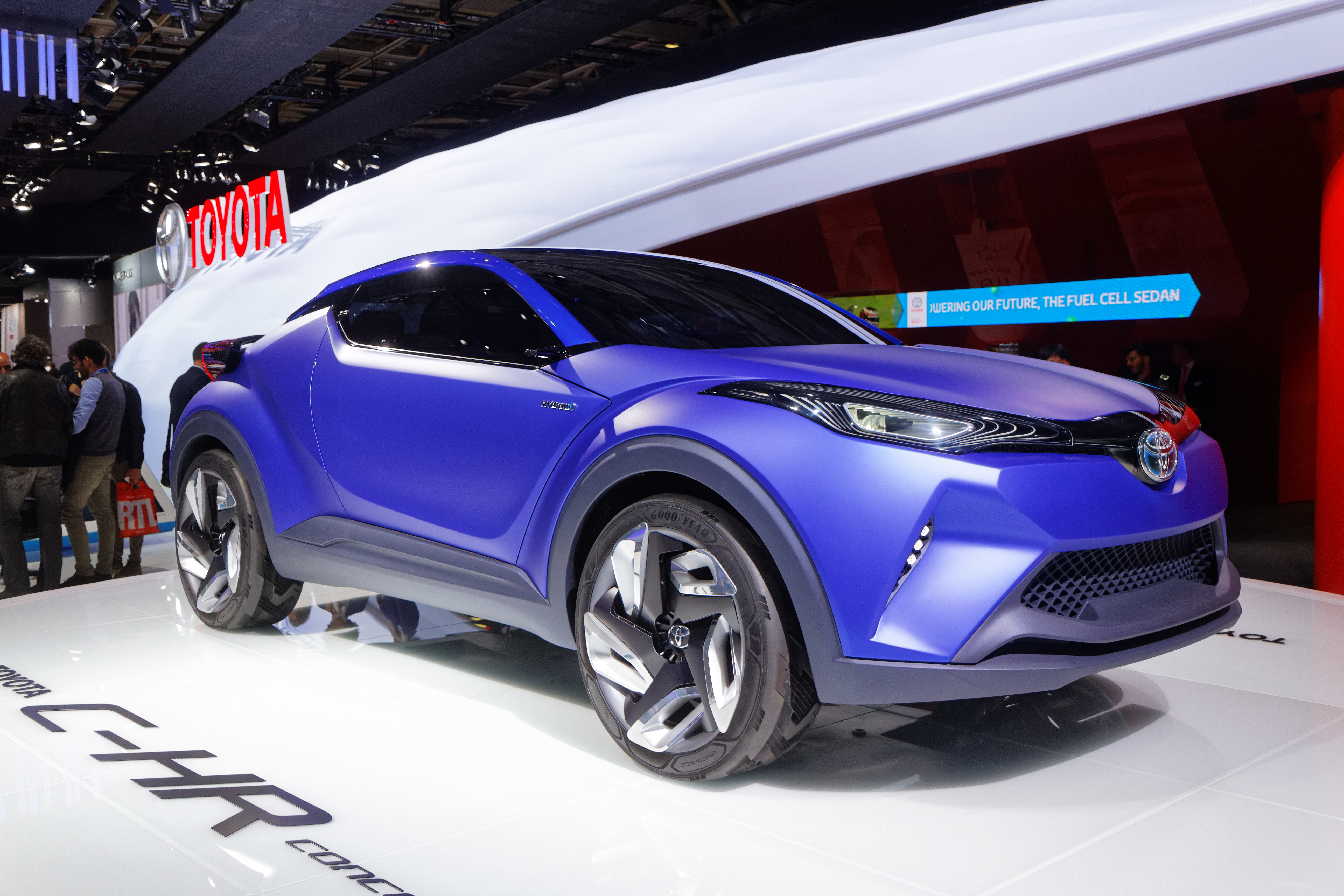 Une Toyota C-HR concept présentée lors du mondial de l'automobile de Paris 2014.